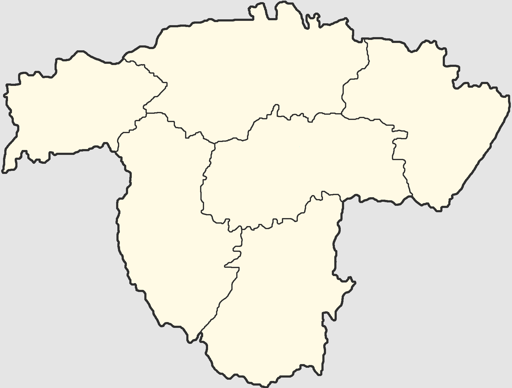 Уезды Уфимской губернии